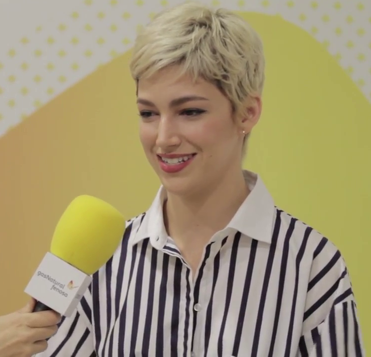 Ursula Corbero